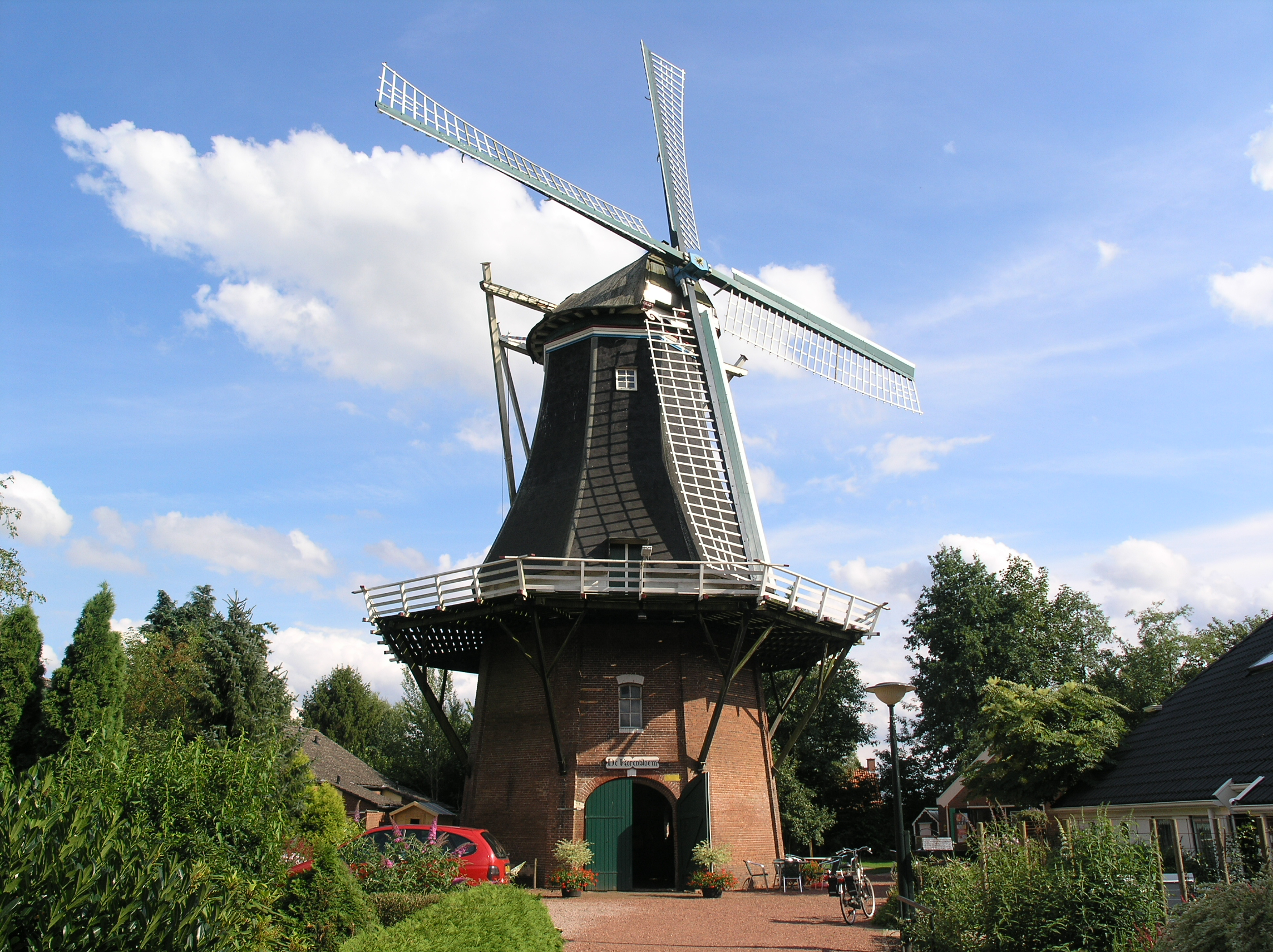 Vriescheloo Stellingmolen De Korenbloem